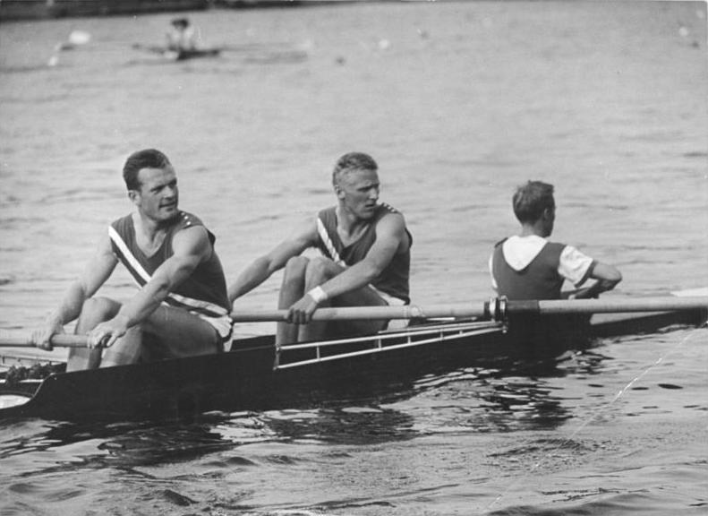 G. Bergau, P. Gorny, K. H. Danielowski Zentralbild Wendorf Na-wpt 1.8.1965 Berlin-Grünau: Deutsche Rudermeisterschaften...am 1.8.1965. Im Zweier mit Steuermann holte sich das favorisierte Boot der ASK Vorwärts Rostock mit Peter Gorny, Günter Bergau und Steuermann Karl Heinz Danielowski den Meistertitel.